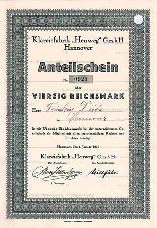 Anteilschein Nummer 0923 über Vierzig Reichsmark der Klareisfabrik Heuweg GmbH Hannover vom 1. Januar 1939 ...